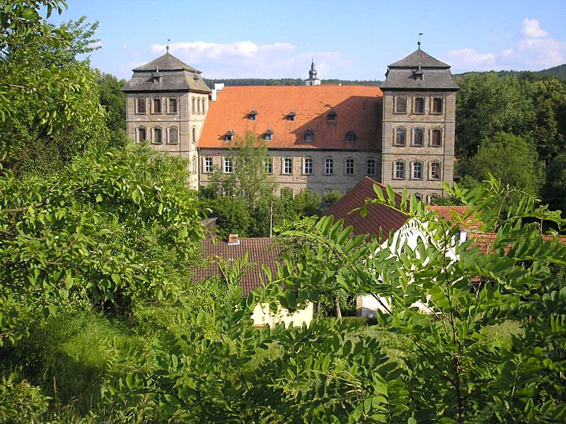 Schloss Burgpreppach (Landkreis Haßberge, Unterfranken) / Burgpreppach Castle, Franconia, Germany. Ansicht von Norden/ View from north. Eigene Aufnahme, Juni 2006 / Own photo, June 2006)